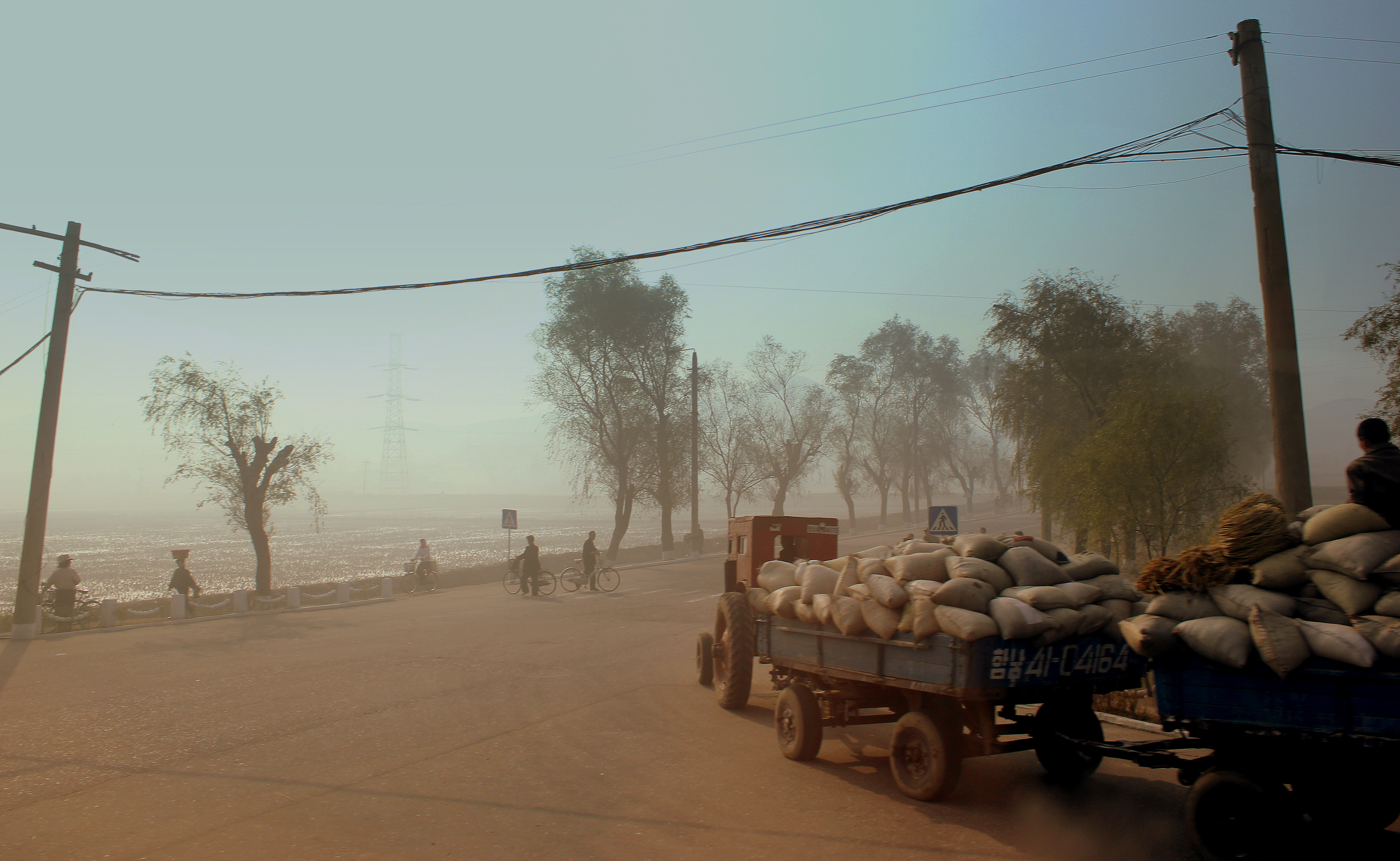 HAMHUNG DPRK NORTH KOREA OCT 2012